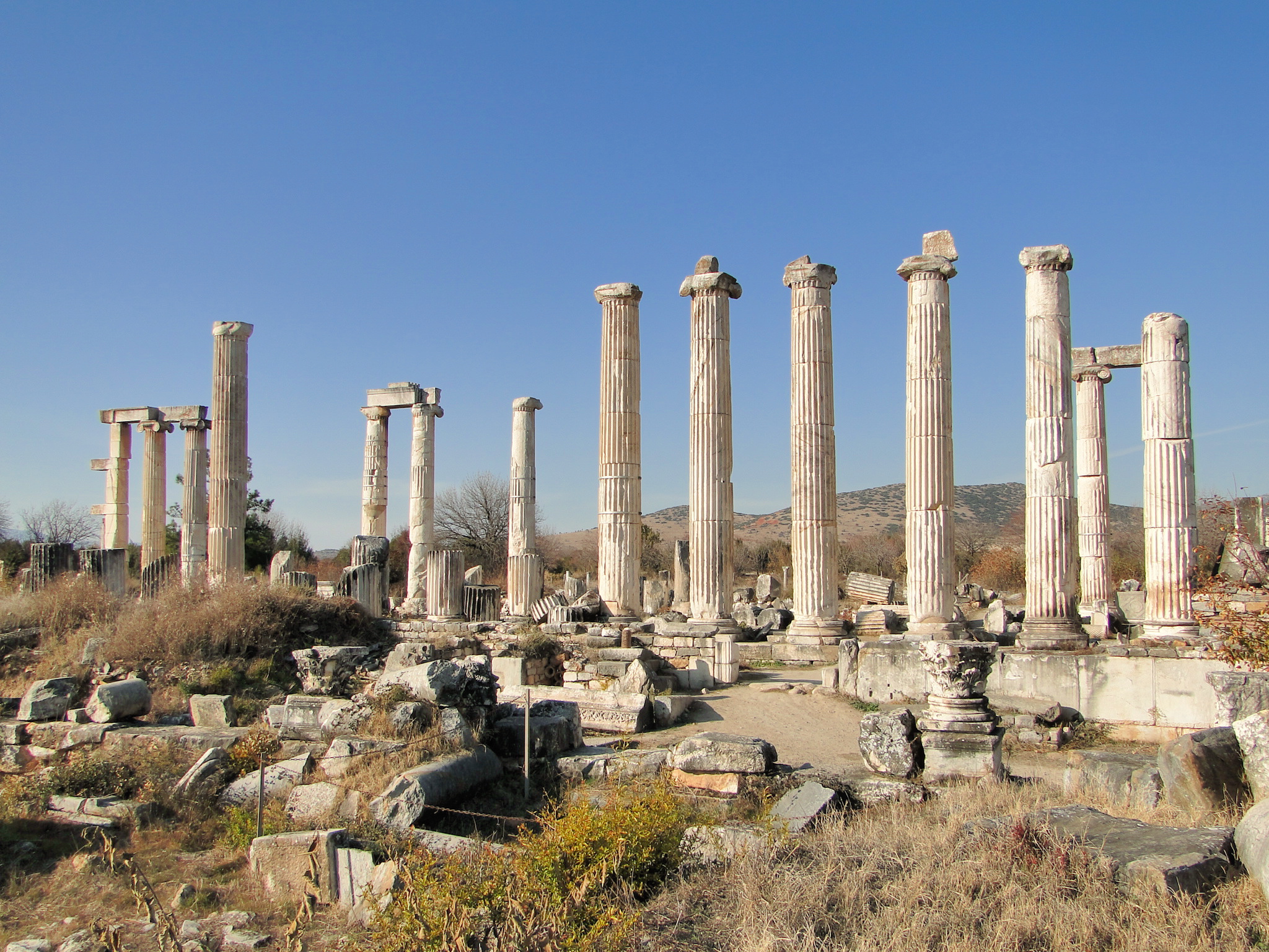 Afrodisias Turquie